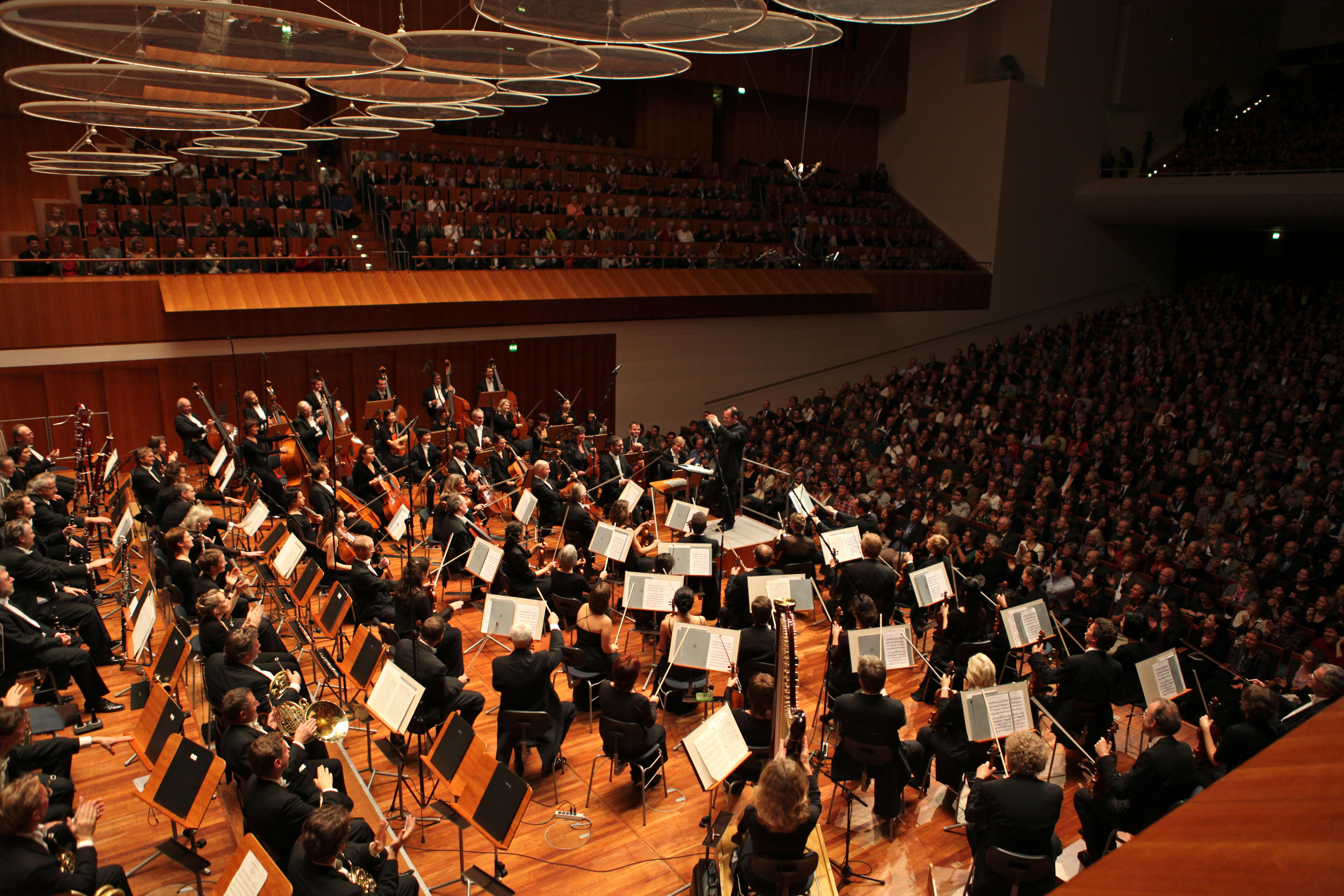 SWR Sinfonieorchester Baden-Baden und Freiburg; Konzert 29.10.2011, Konzerthaus Freiburg